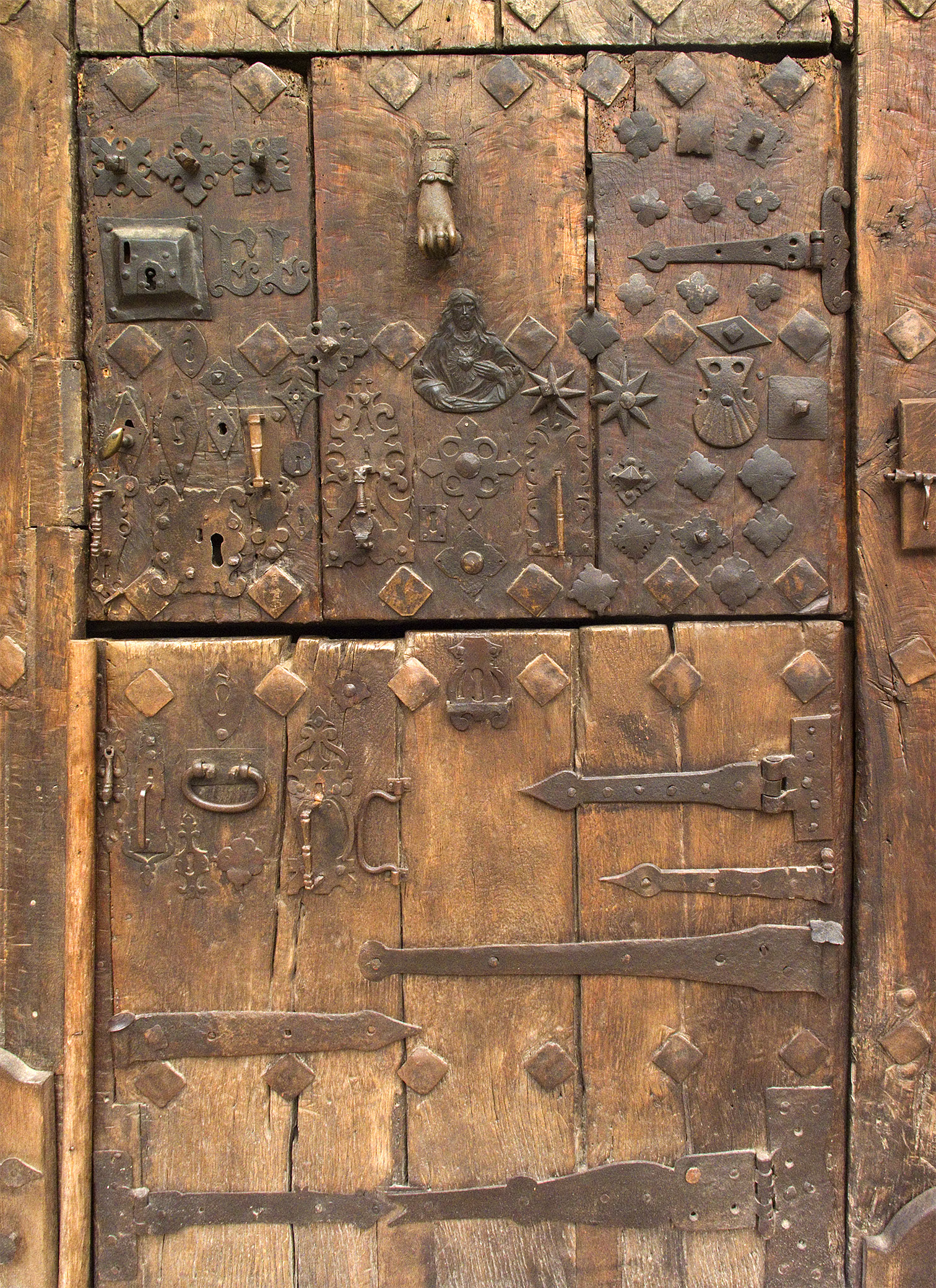 Puerta.Barrio Monumental.Estella-Lizarra.Navarra.